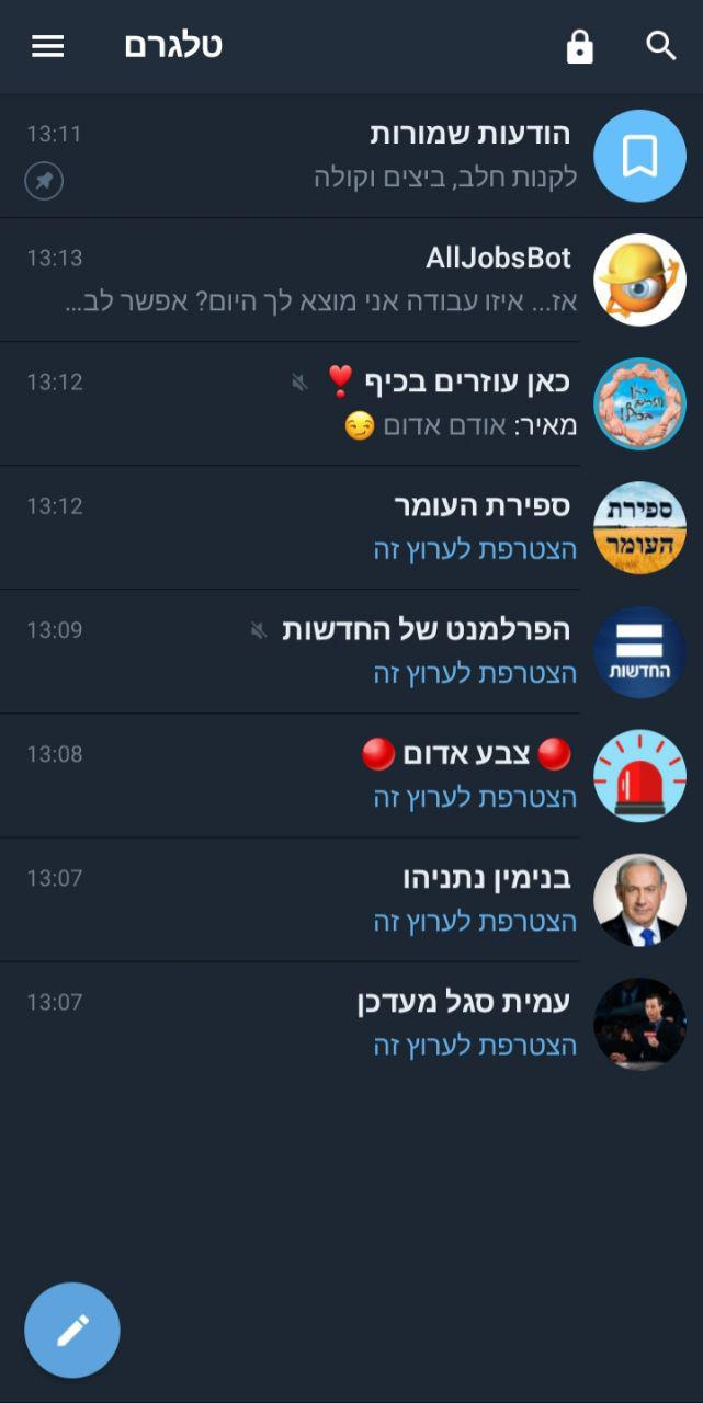 טלגרם בעברית. גרסה 5.12.1 בערכת נושא כהה